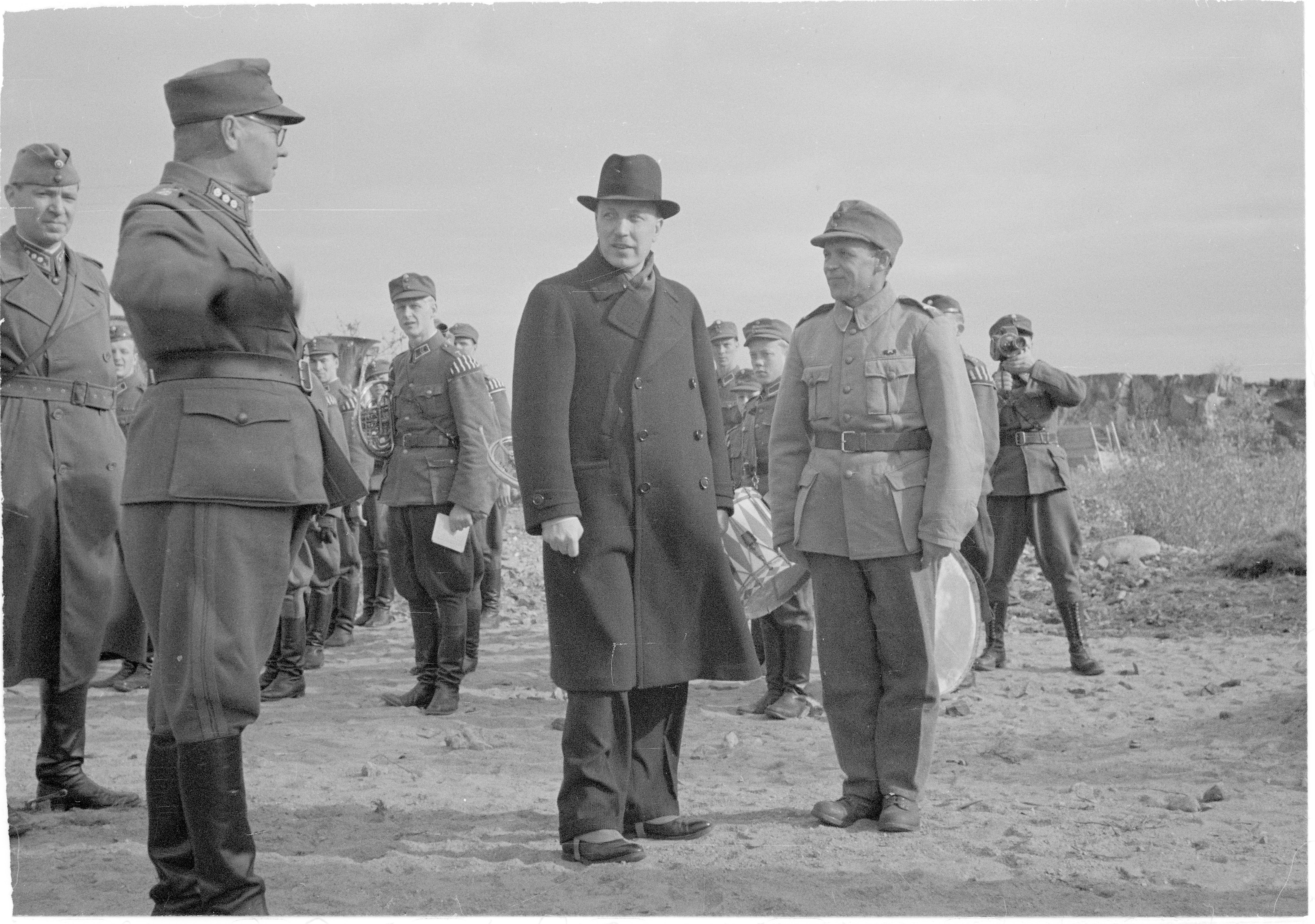 Presidentti keskustelee taiteilija Tynyksen kanssa. (Kuvassa ovat Rannikkotykistörykmentti 1 komentaja eversti Väinö Marjanen (vas.), presidentti Risto Ryti ja kuvanveistäjä Arvi Tynys) Kuvauspaikka: Mäkiluodon linnake.